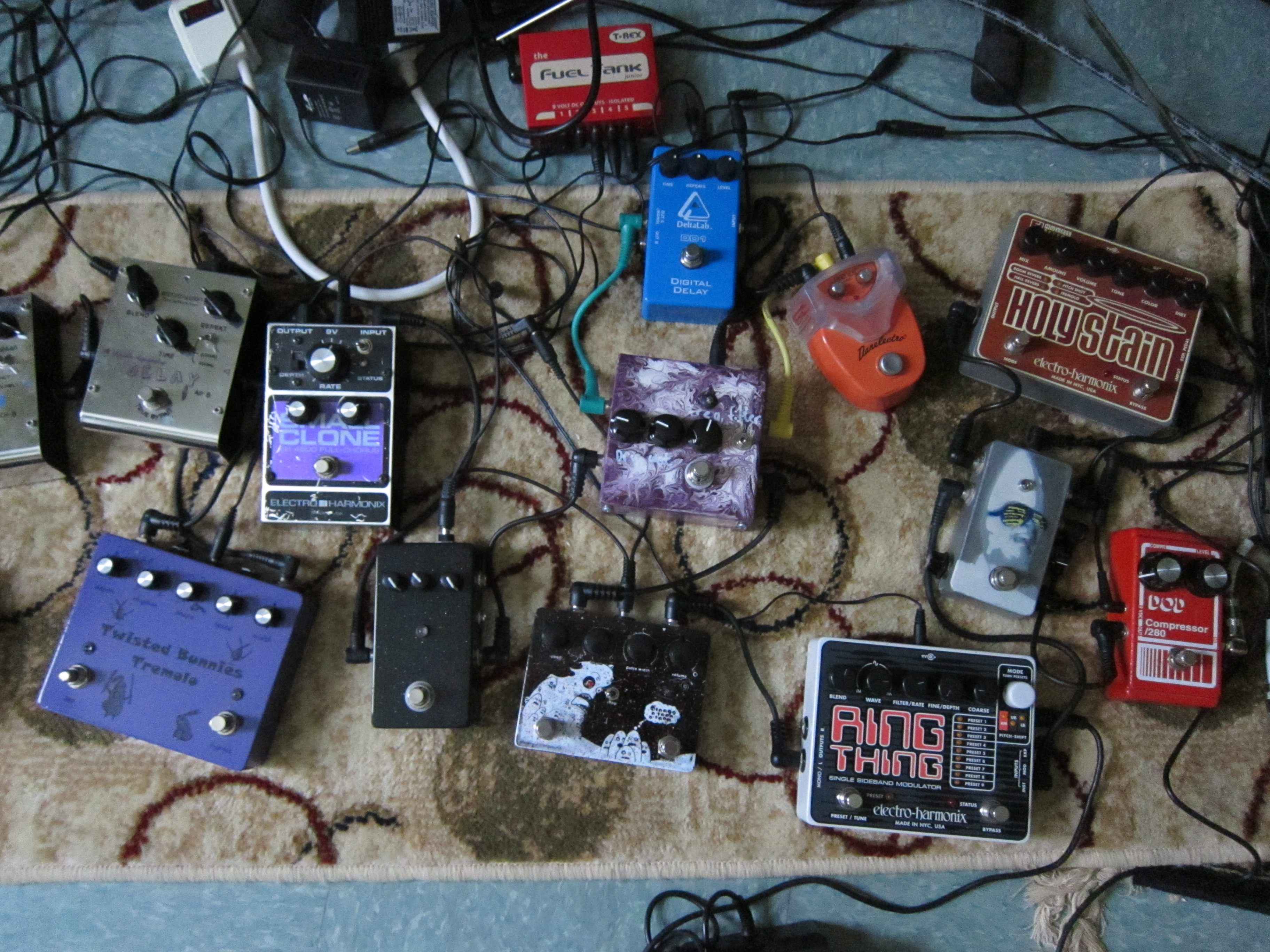 Guitar pedals by Oldangelmidnight, 2011-10-29 16:34:51